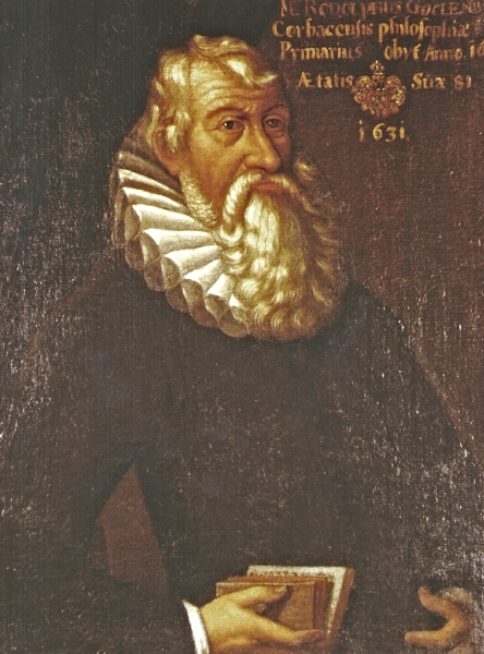 Rudolf Goclenius der Ältere (* 1. März 1547 als Rudolf Gockel (oder Göckel) in Korbach, Grafschaft Waldeck; † 8. Juni 1628 in Marburg) war Professor für Philosophie, Logik, Metaphysik und Ethik an der Philipps-Universität Marburg. Auch als Hexentheoretiker trat er in Erscheinung.